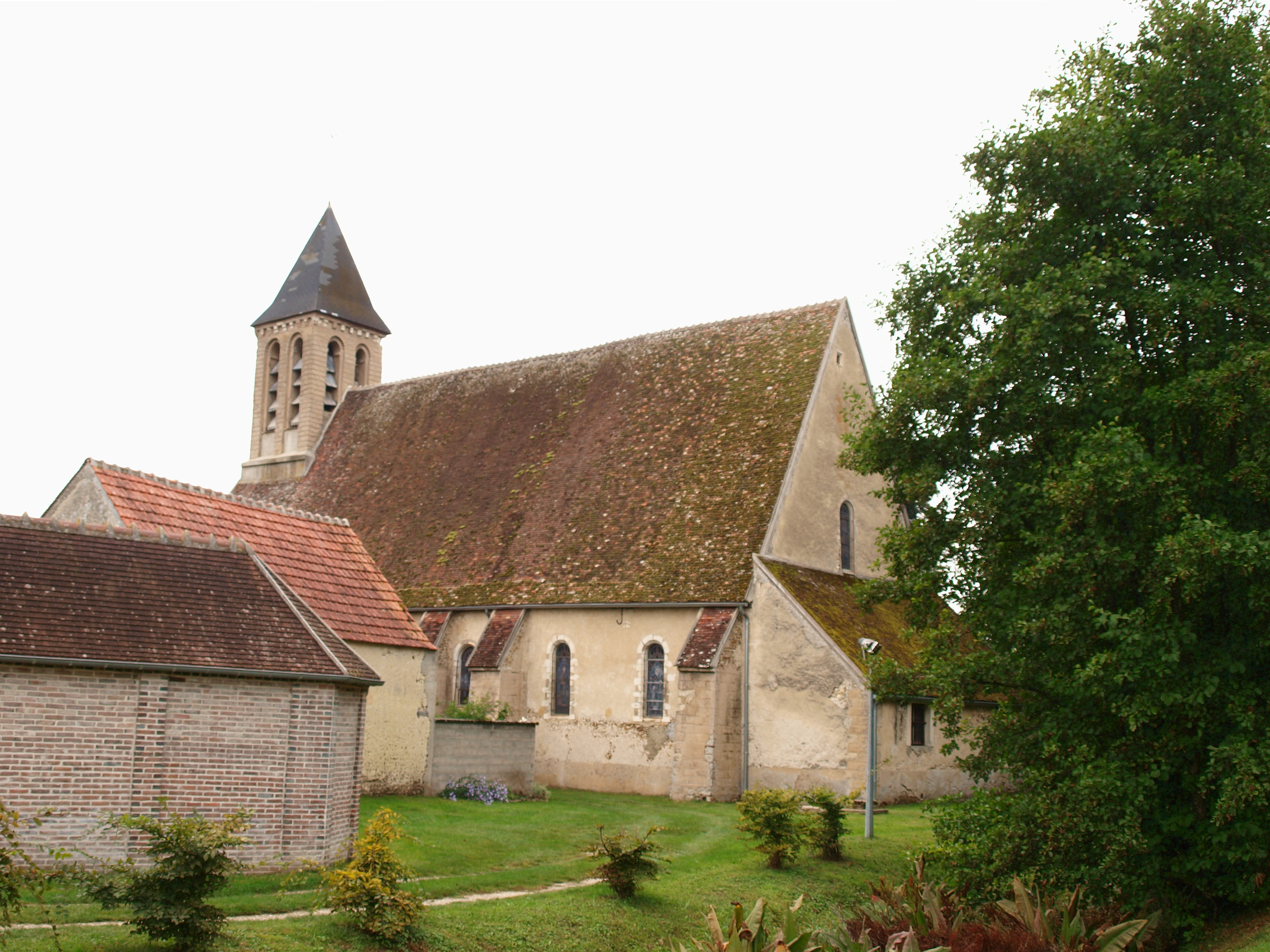 Église Saint-Martin-et-Saint-Marc de Sépeaux (Yonne, France)